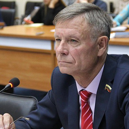 Андрей Альбертович Кузьмин − депутат госдумы VII созыва с 9 сентября 2018 года